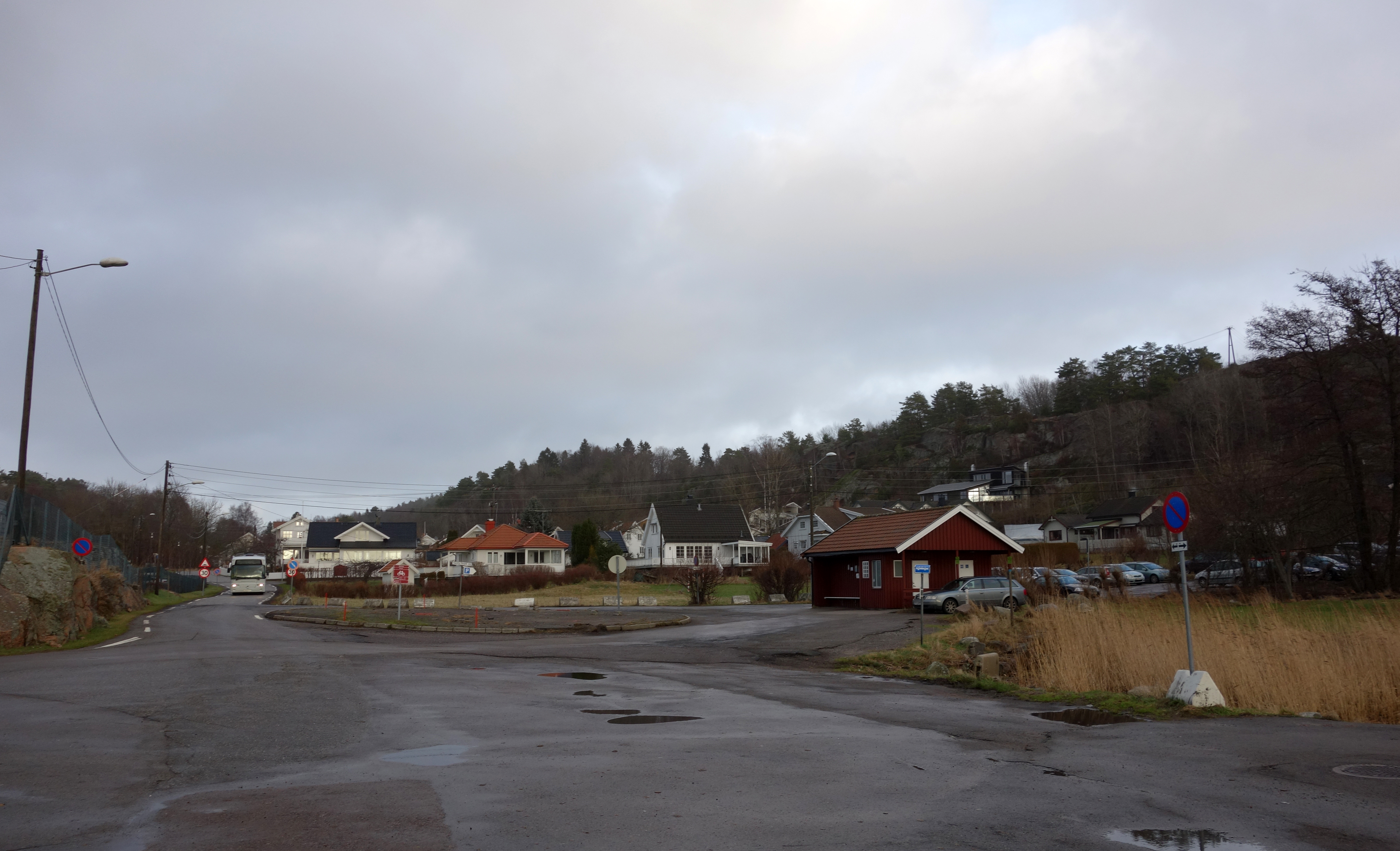 Tenvik på Nøtterøy i Vestfold, sett fra kaia